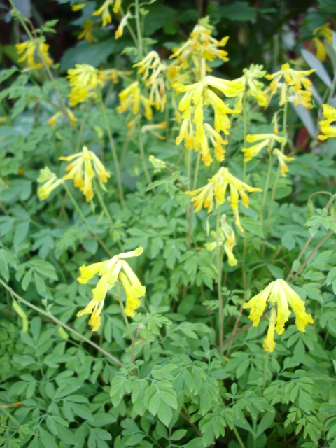 Pseudofumaria lutea